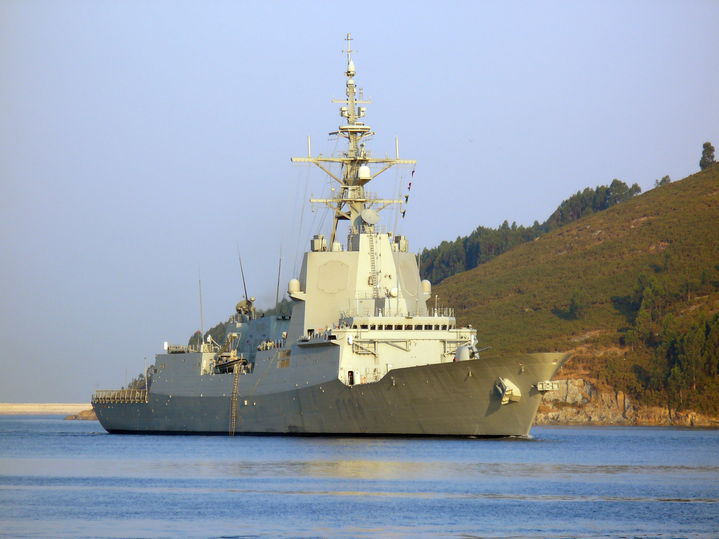 La fragata Méndez Nuñez (F-104) en la boca de la ria del de Ferrol